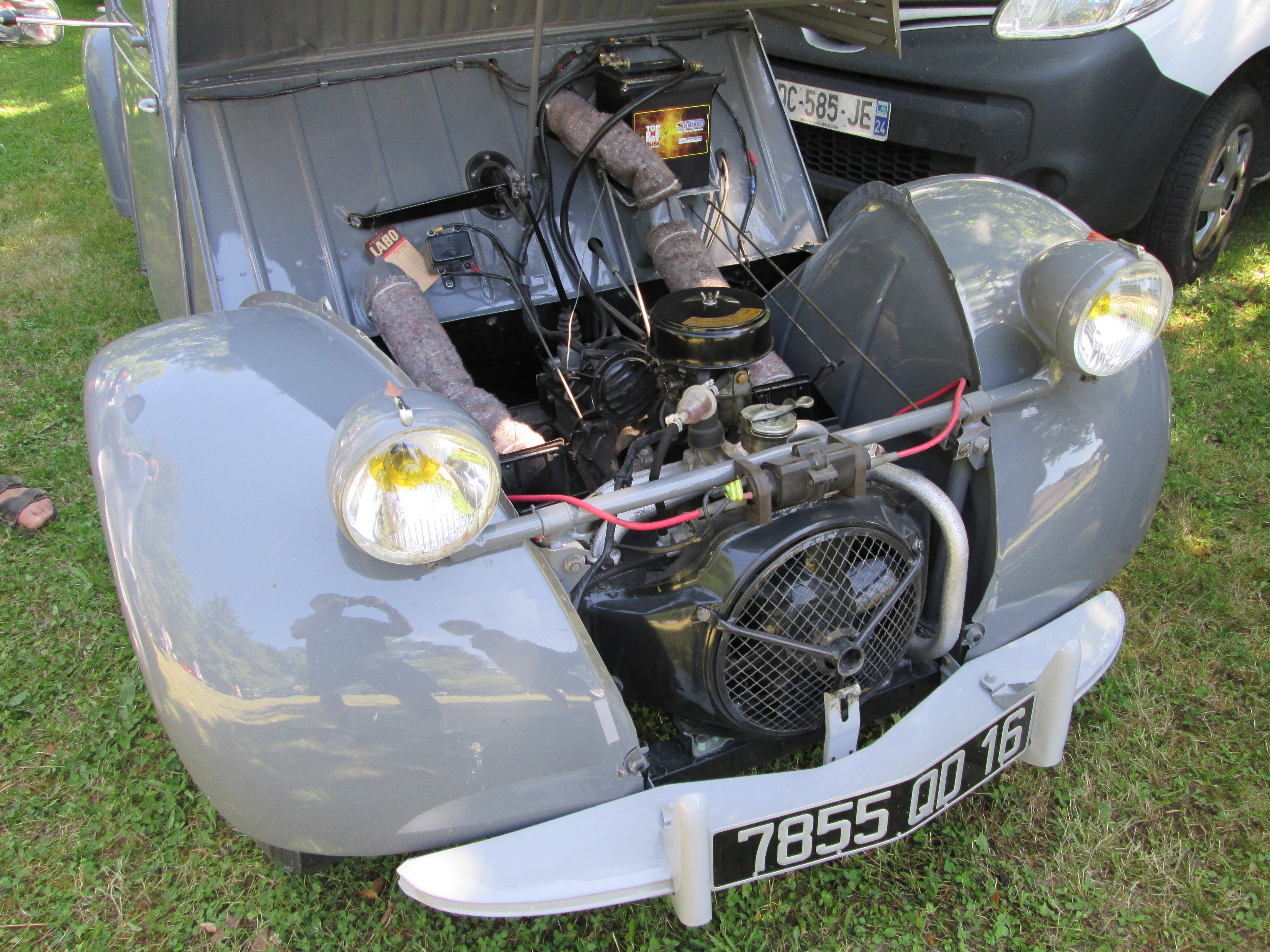 Citroën 2 CV type AZ de 1957, gris perle : moteur de 425 cm3.